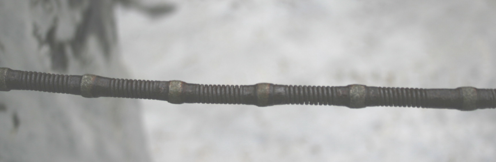 Sägeseil für die Steingewinnung